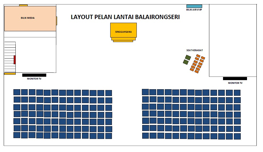 sejarah bangunan istana arau